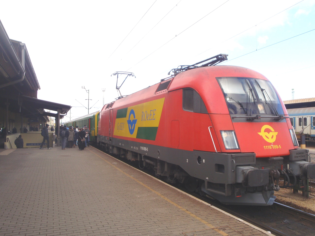 GySEV 1116 059-5 bérelt Taurusa Szombathelyen